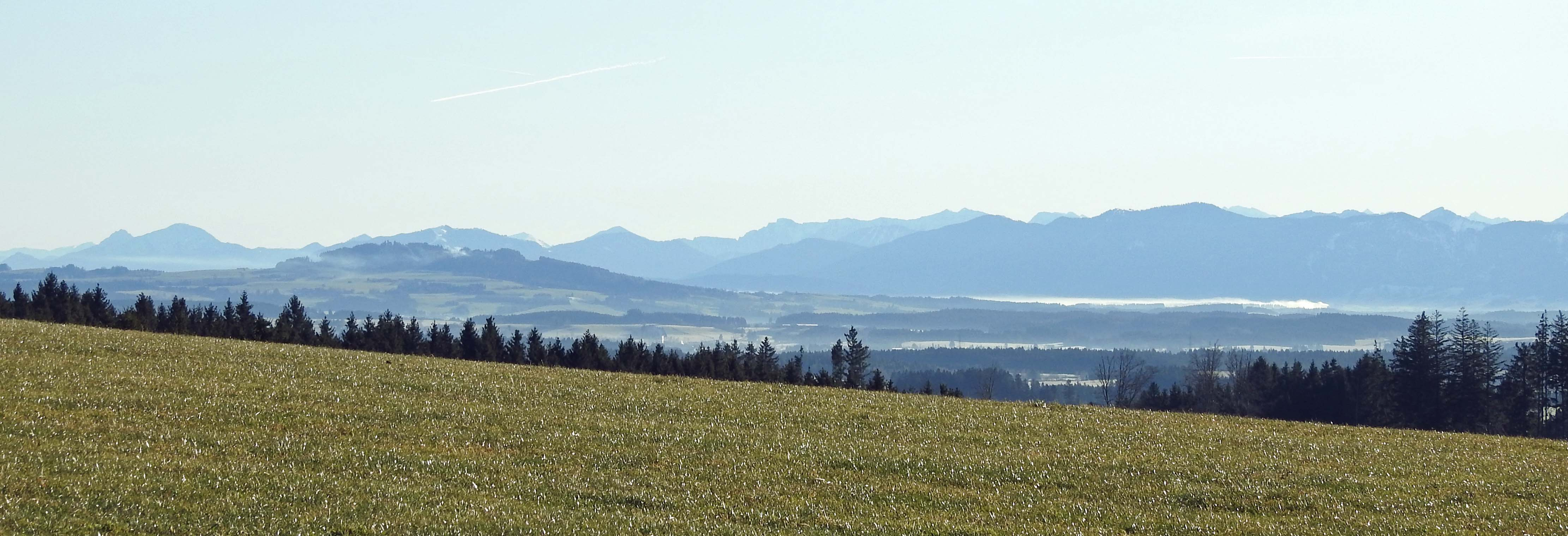 Blick vom Schlegelsberg zum Auerberg und Trauchberg bzw. Ammergebirge